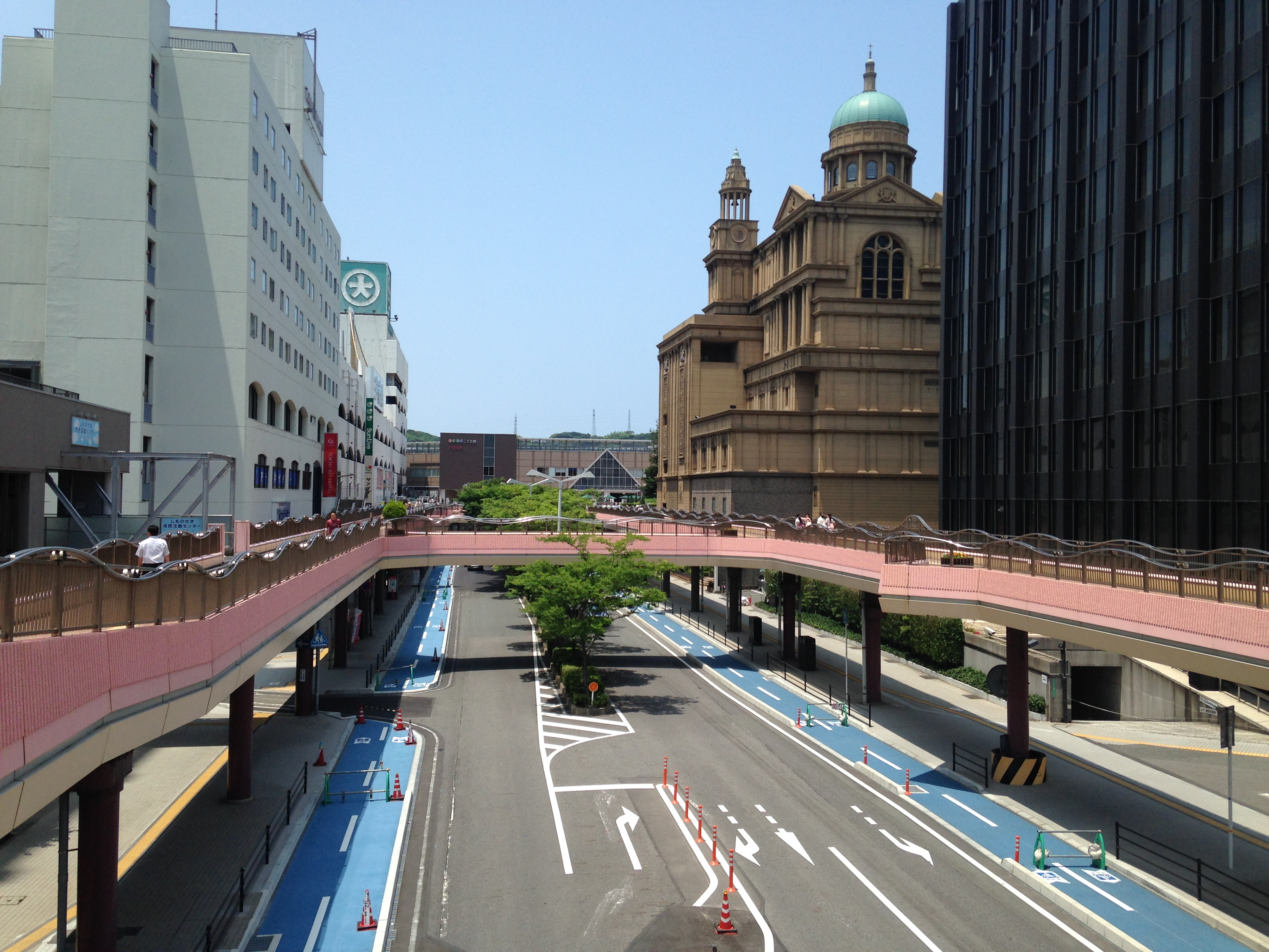 下関駅の遠景。下の道路は山口県道323号